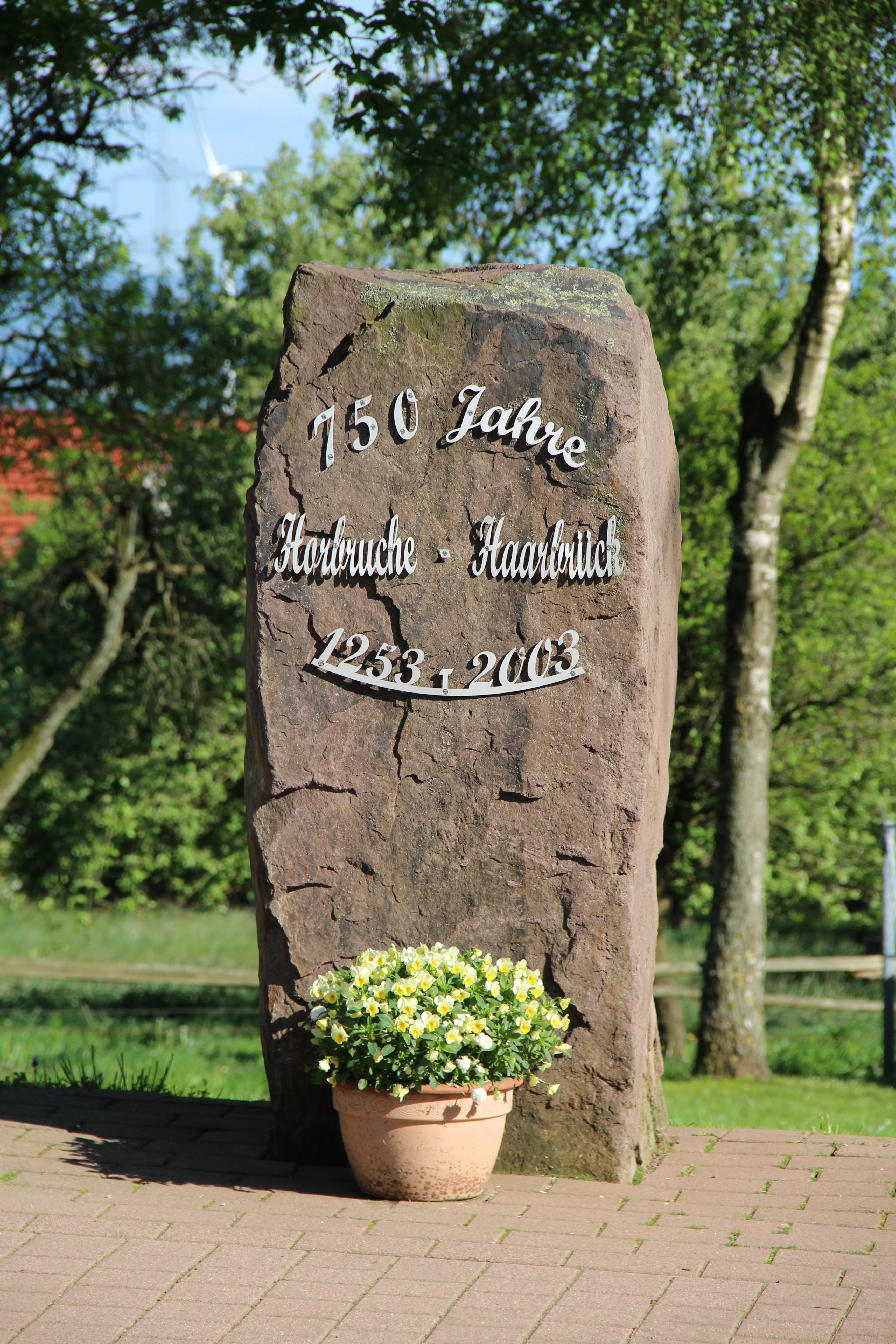 Gedenkstein 750 Jahre Horbruche - Haarbrück